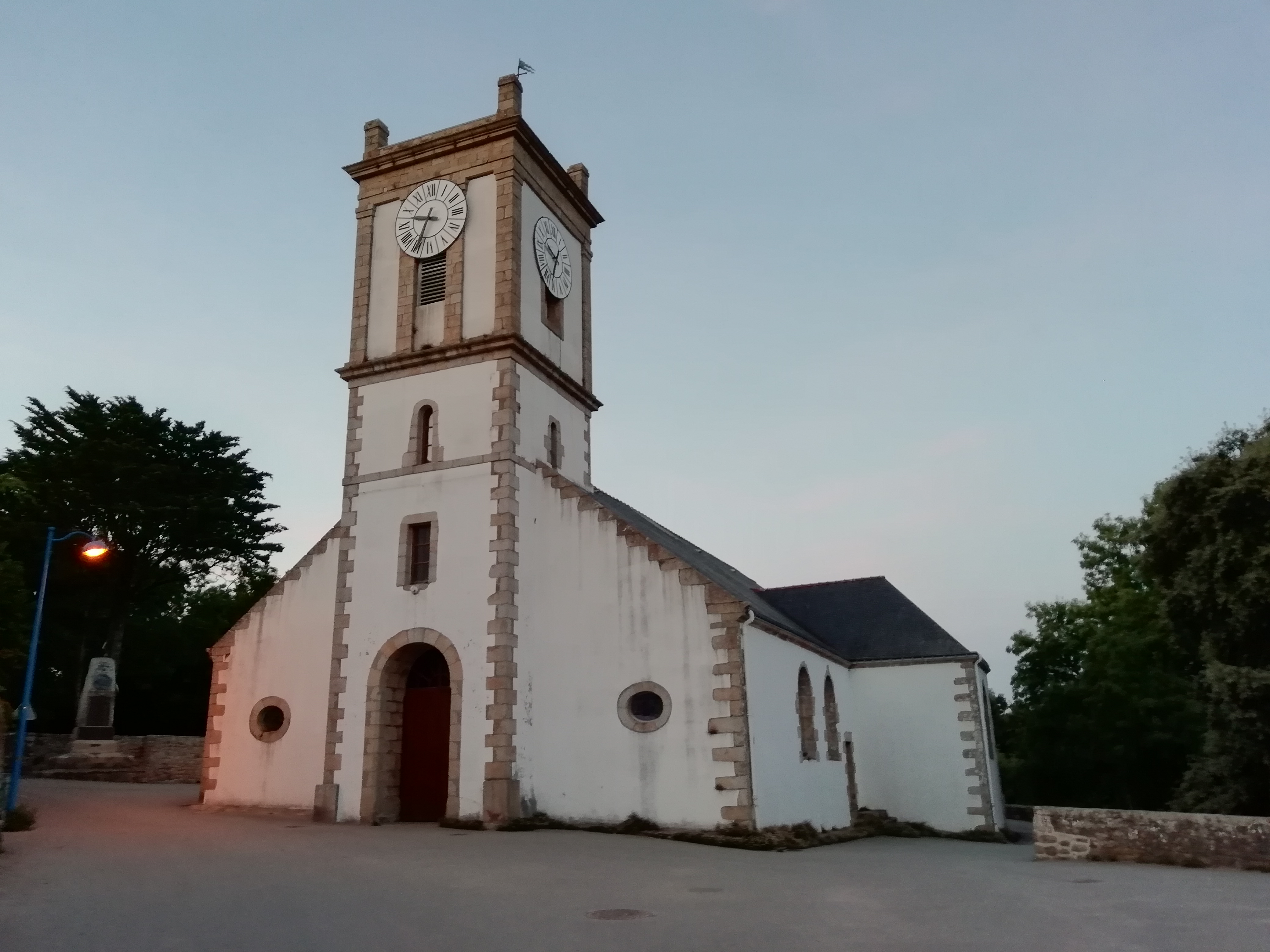 Auf der Ile aux Moines